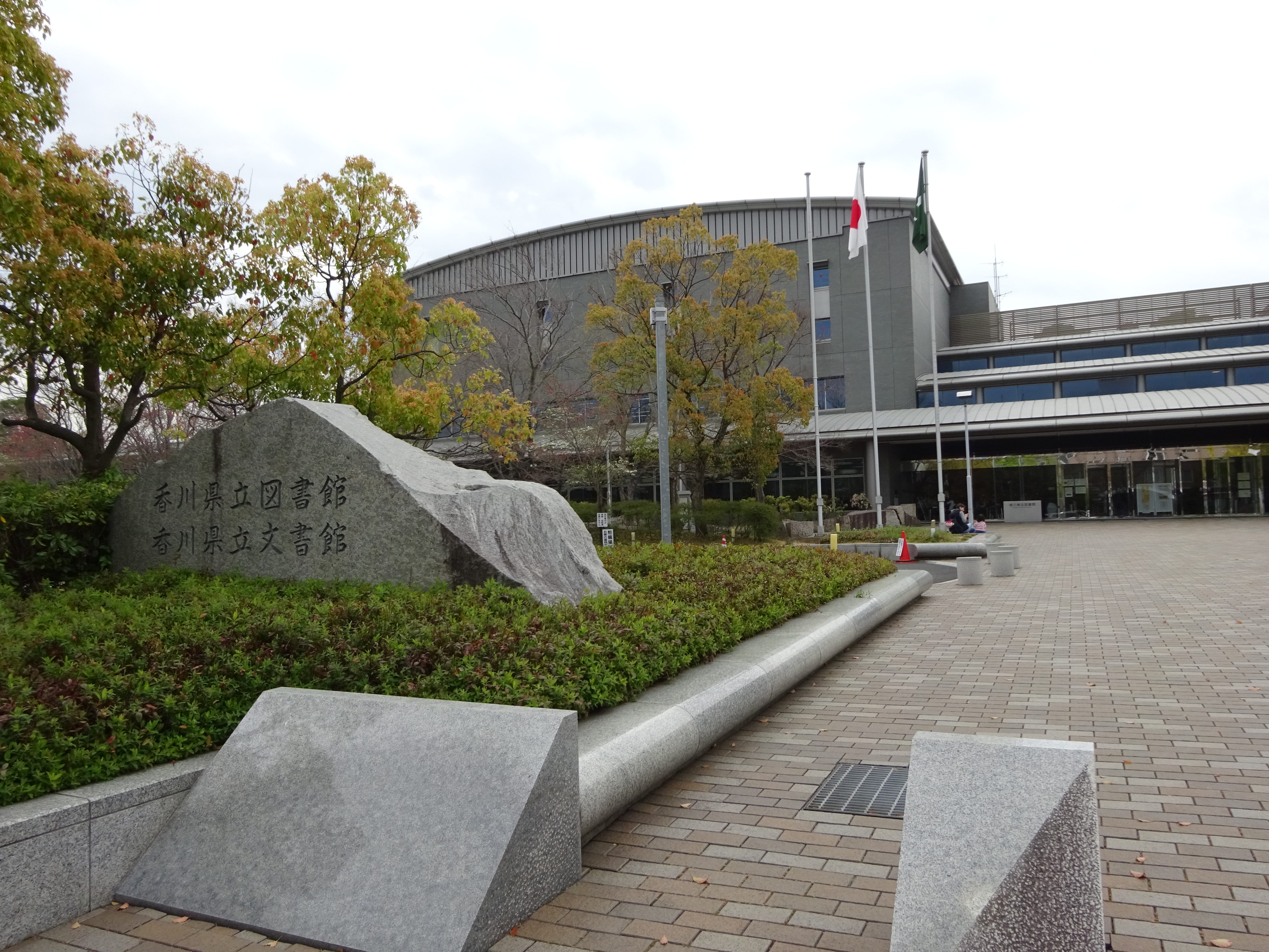 香川県立図書館（正面の外観）